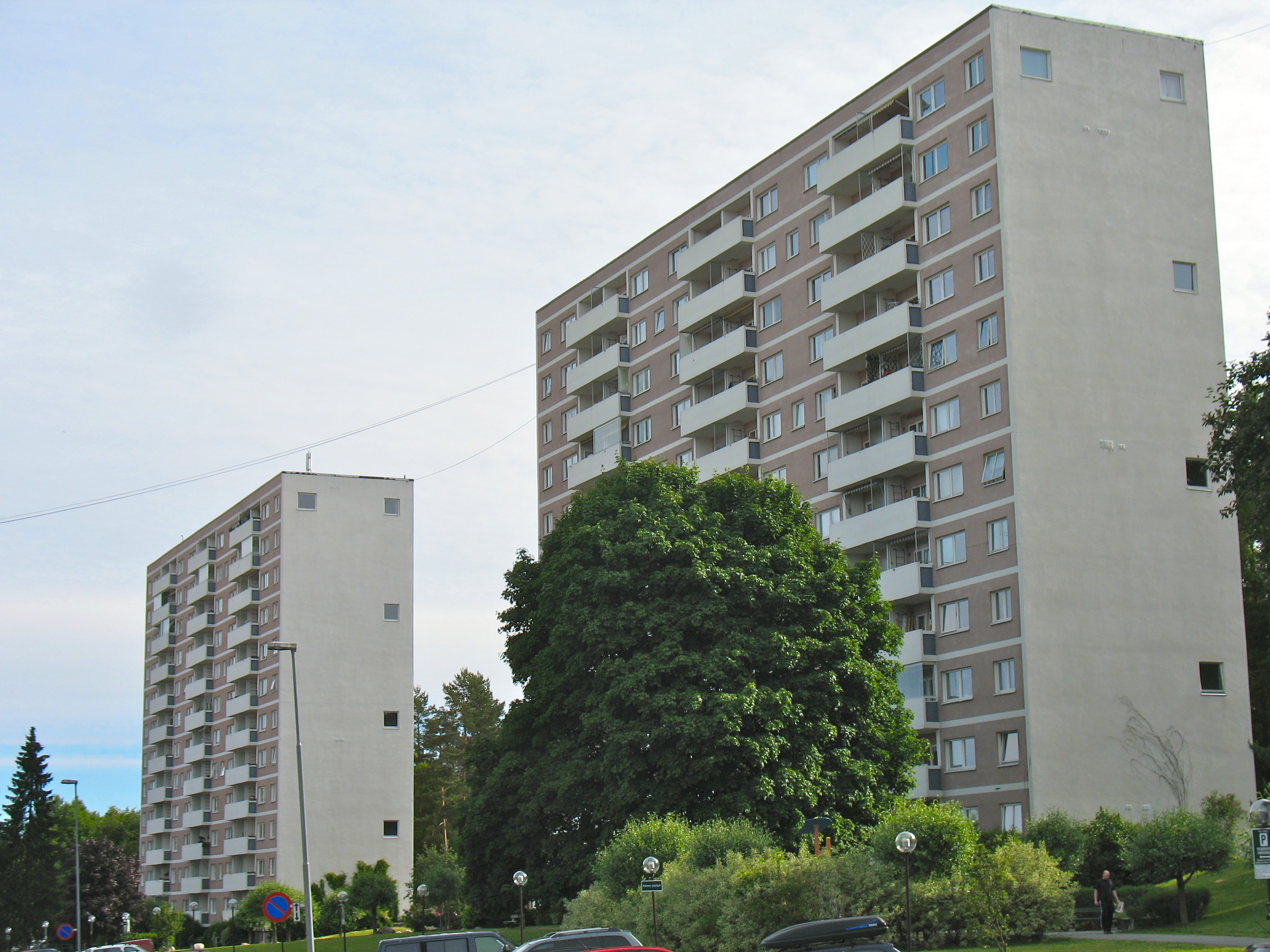 Bølerlia 6 og 8. Bøler i Oslo.